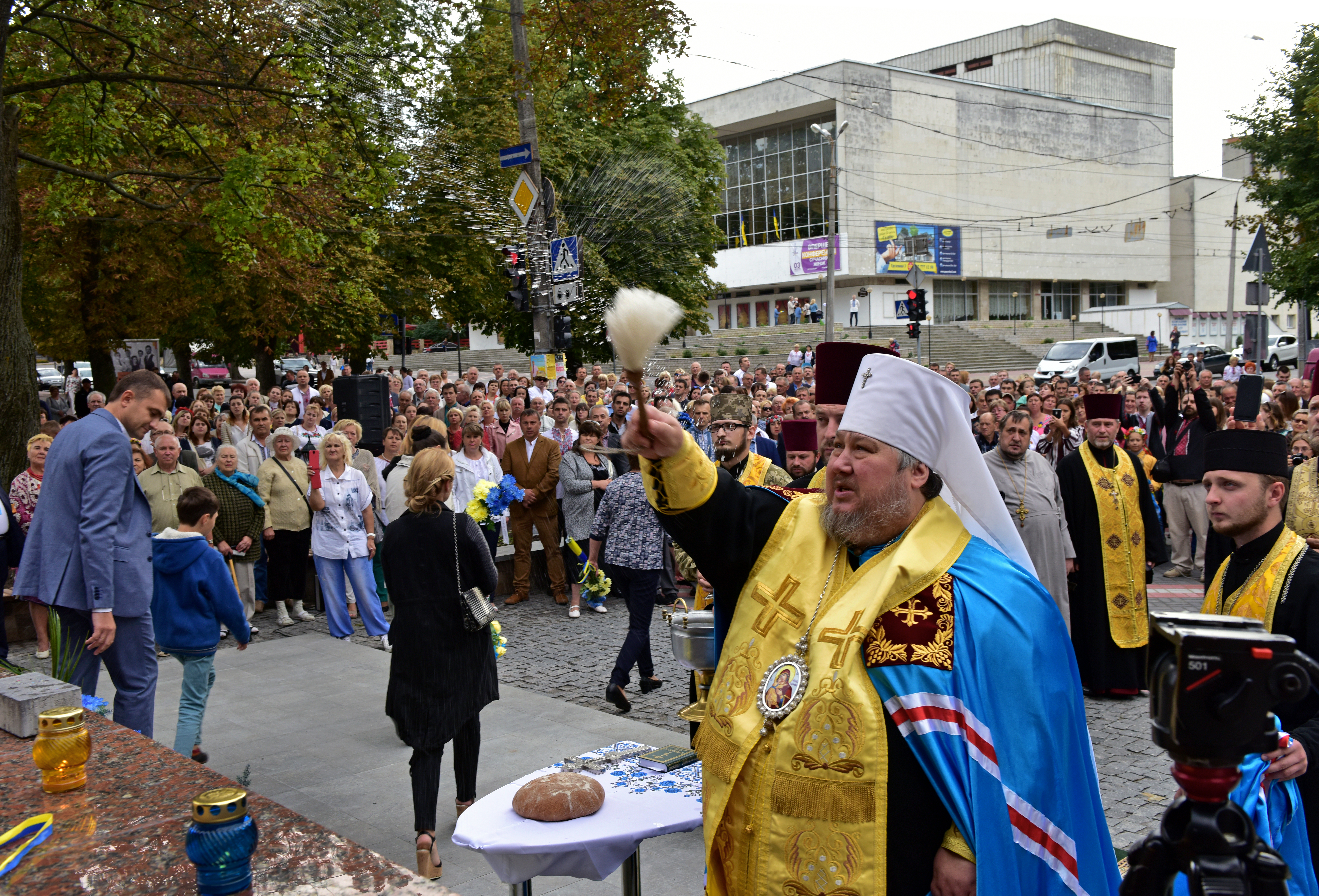 Митрополит Хмельницький і Кам'янець-Подільський Антоній (в миру Махота Владислав Васильович)